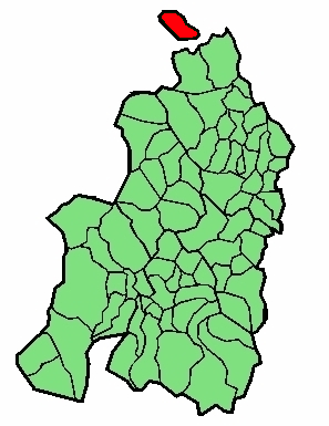 aipaturiko udalerriaren kokapena Nafarroa Beherean